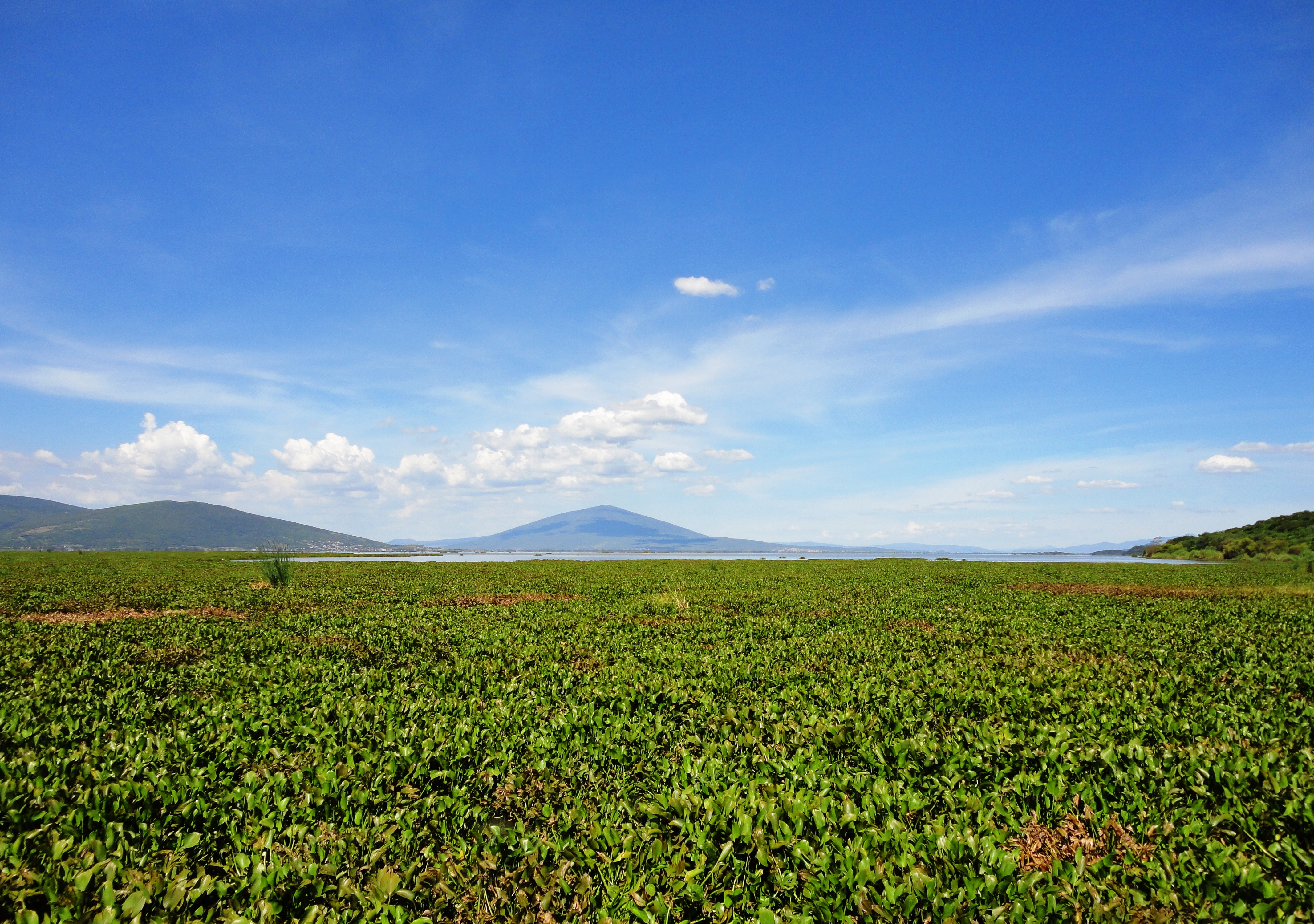 Vista de la Laguna de Yuriria.